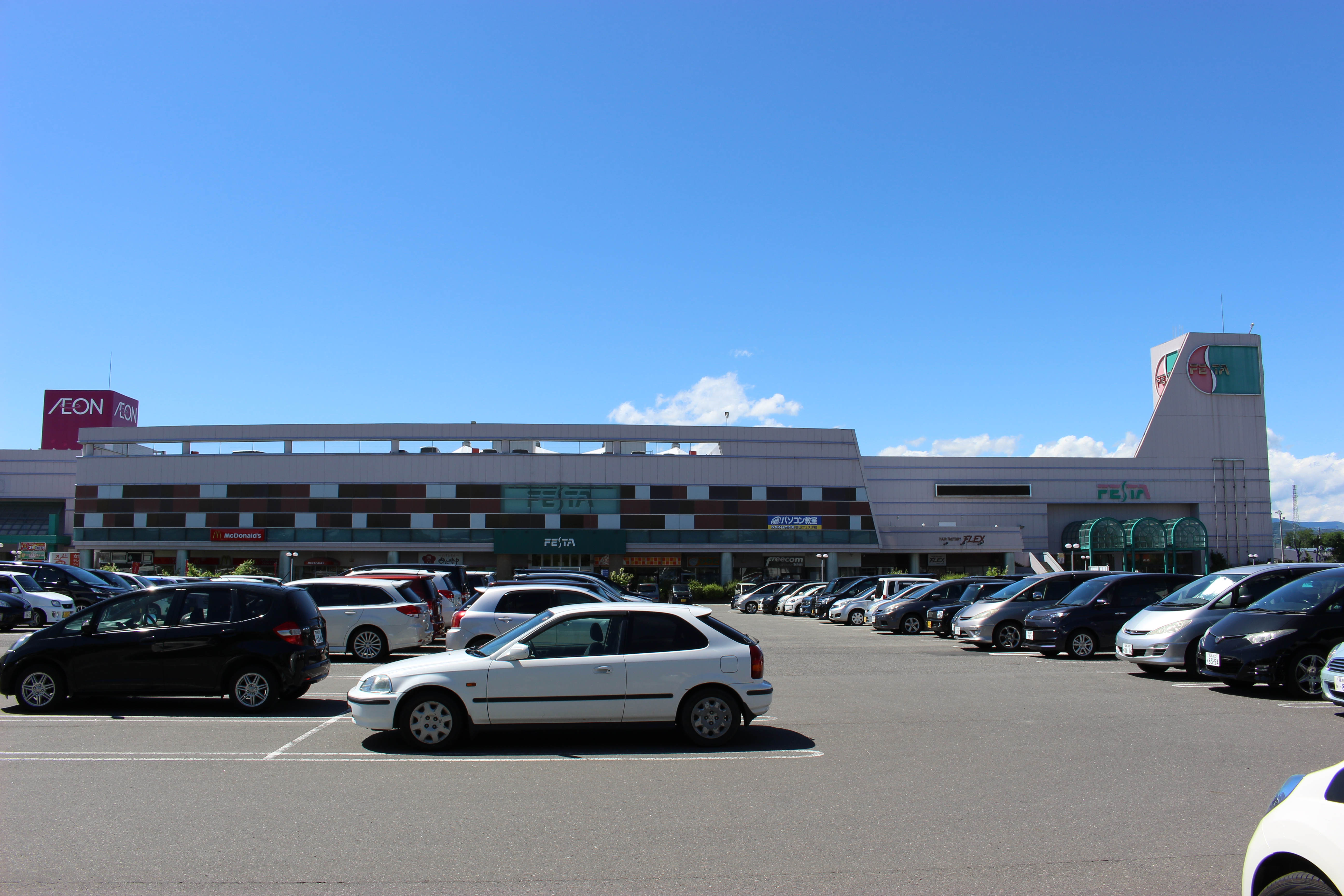 ショッピングモールフェスタ